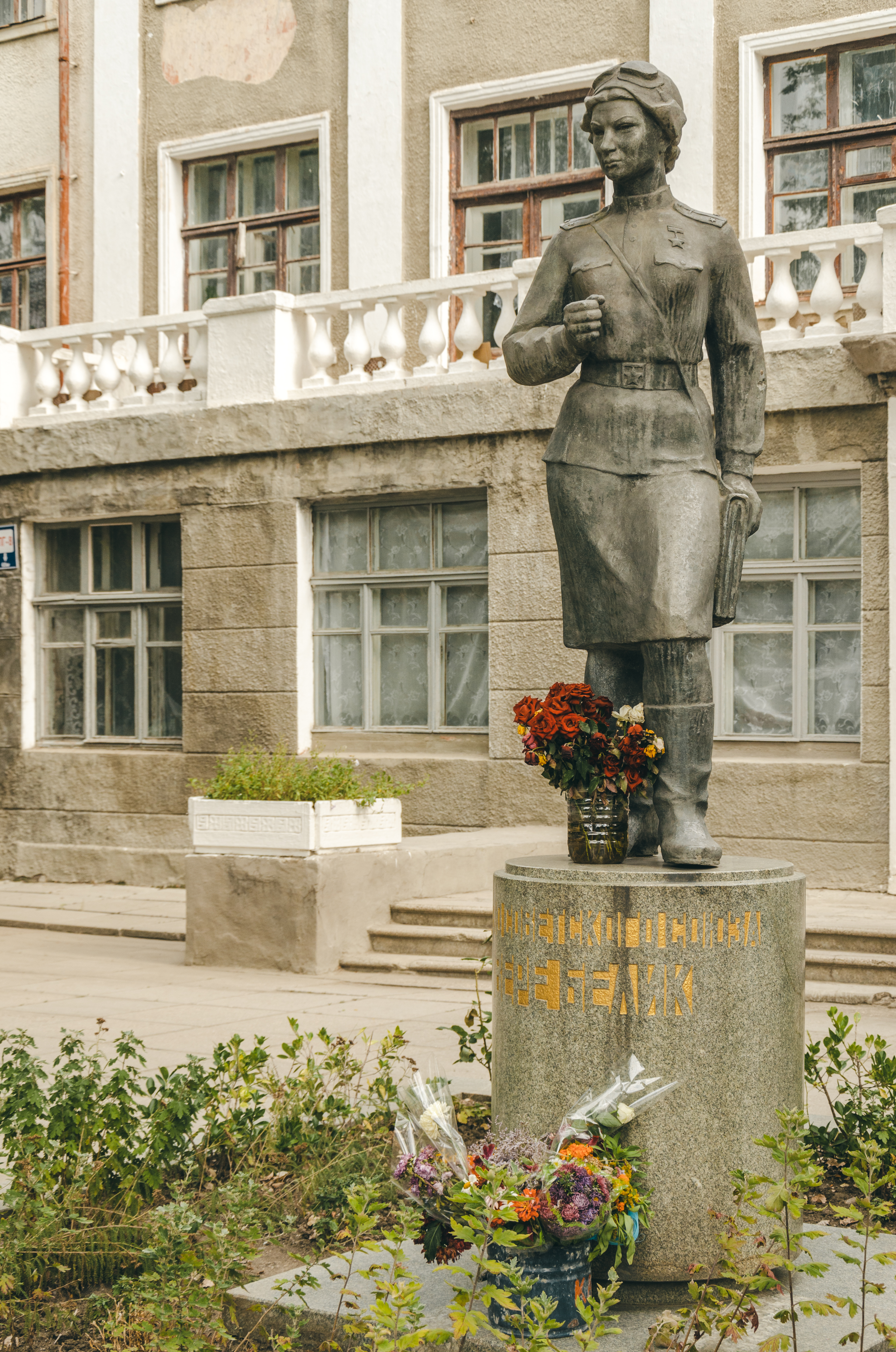 Памятник Герою Советского Союза В.Л.Белик. Дата сооружения: 1966 г.: улица Войкова, у школы №17, Керчь, Крым This object is located on the Crimean Peninsula and recognized as cultural heritage by Russia under the monument ID: 8230415000. The legal status of the Crimean region is currently disputed.